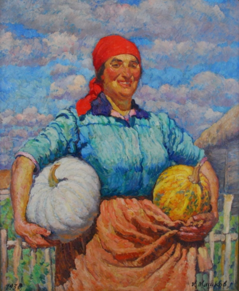 И. И. Машков, Колхозница с тыквами. 1930 г.